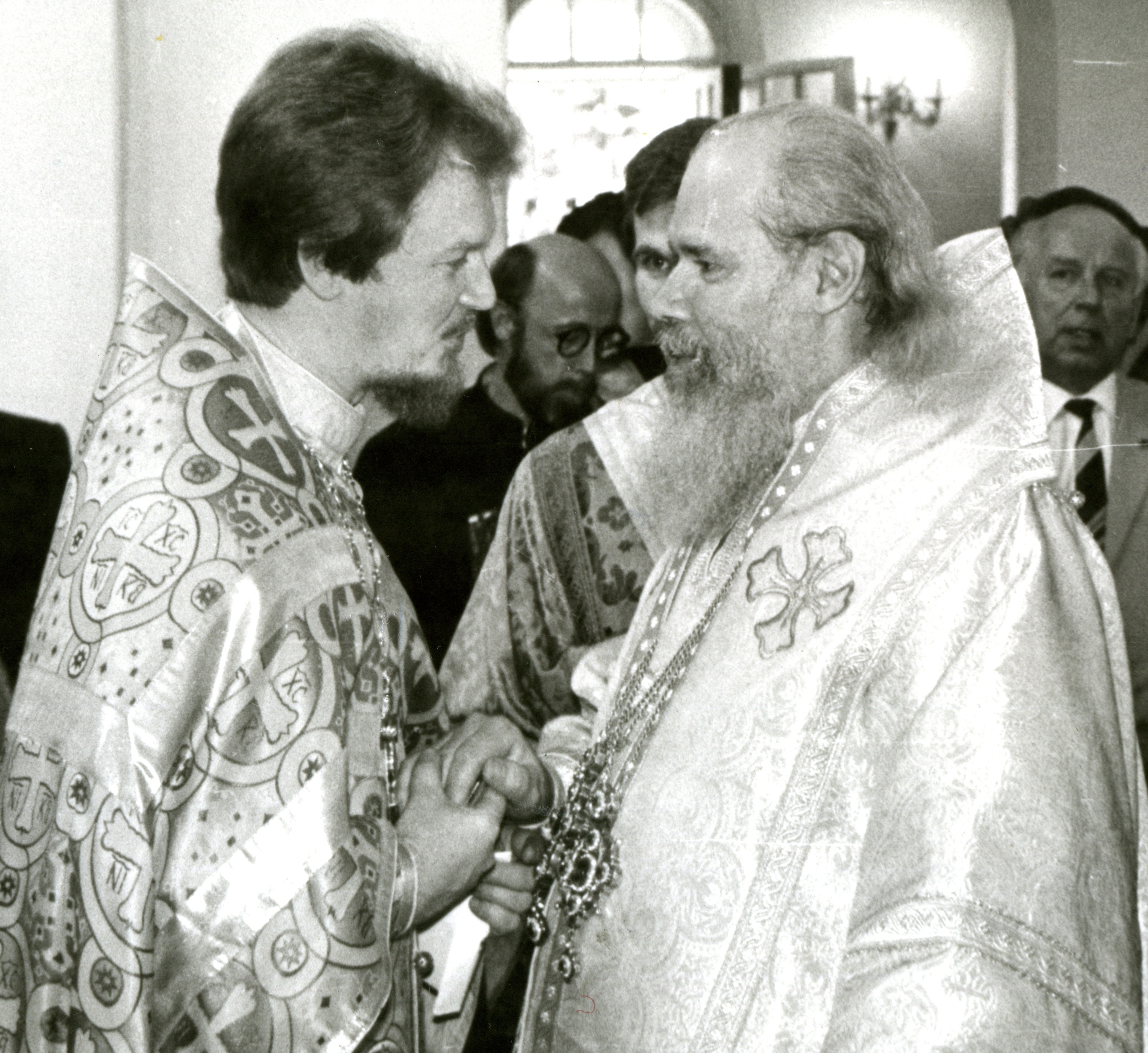 Патриарх Алексий ll и игумен Викентий на освящении Казанской церкви в Зеленогорске.